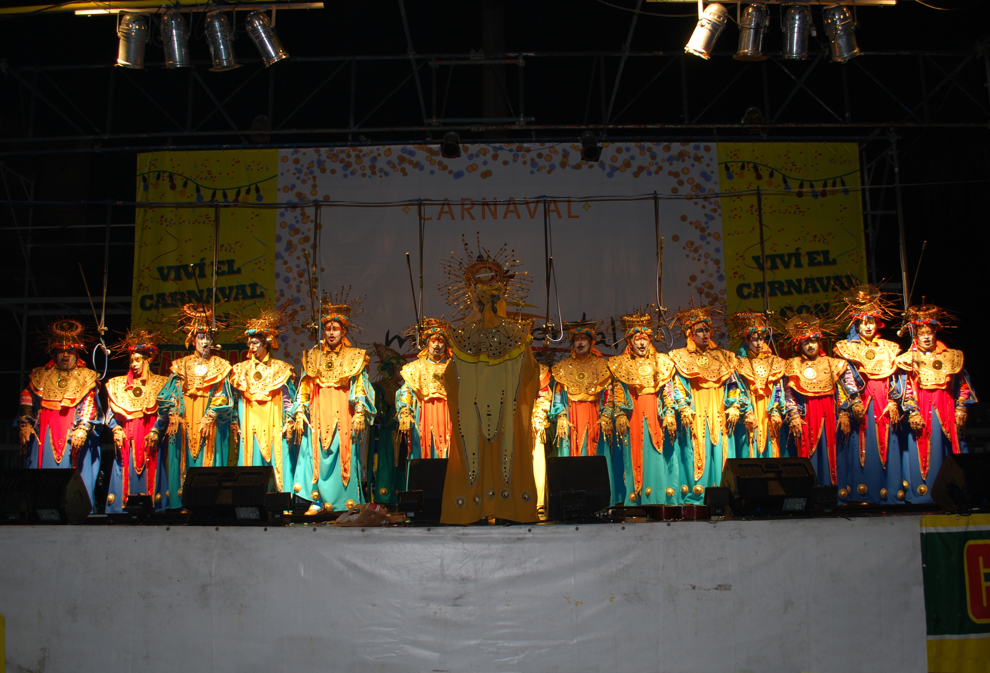 Fotografía de la murga uruguaya "La Gran Siete", en su primera actuación oficial del carnaval en el Carnaval 2009.